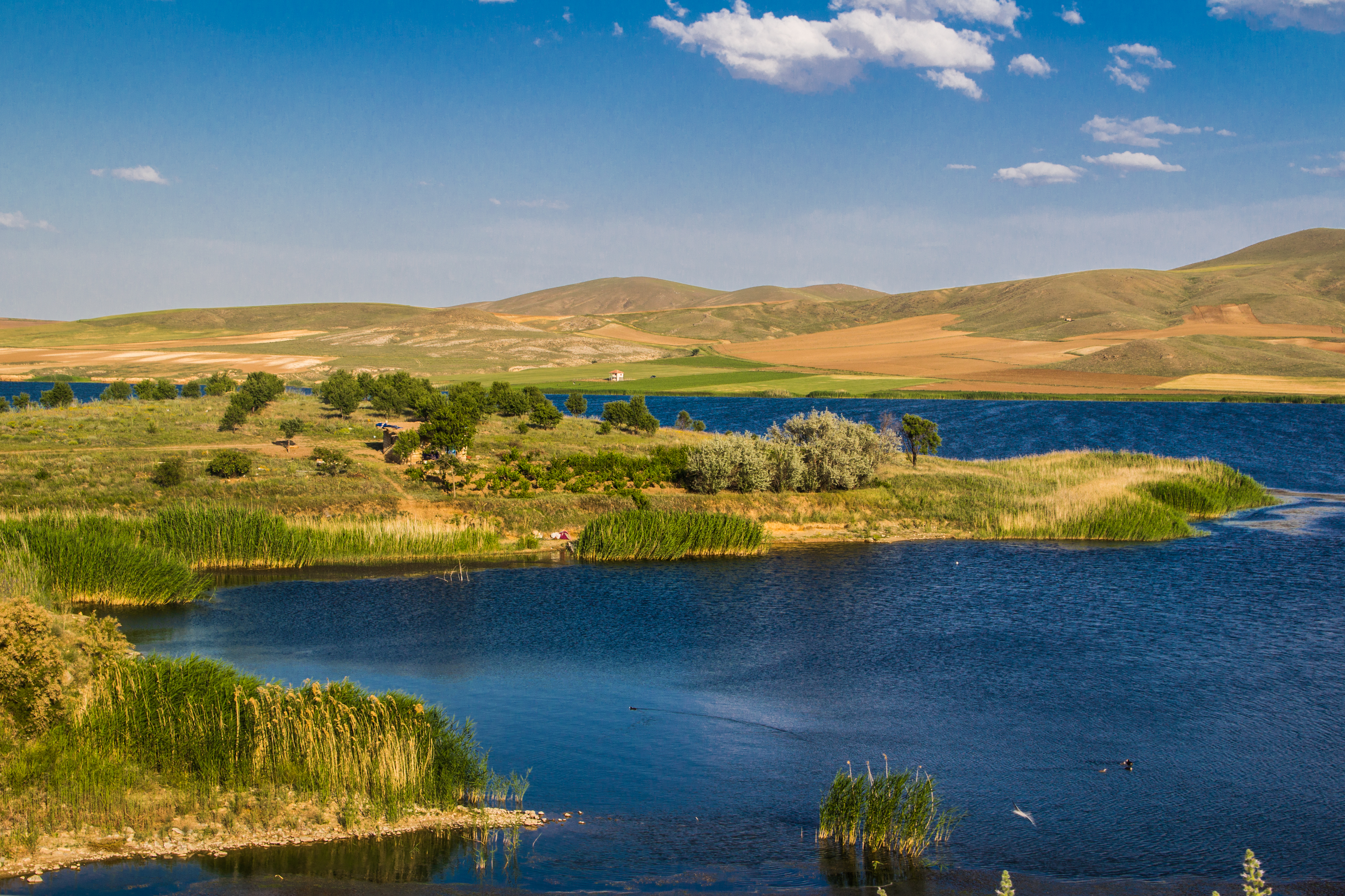 68700 Bekdik/Sarıyahşi/Aksaray, Turkey